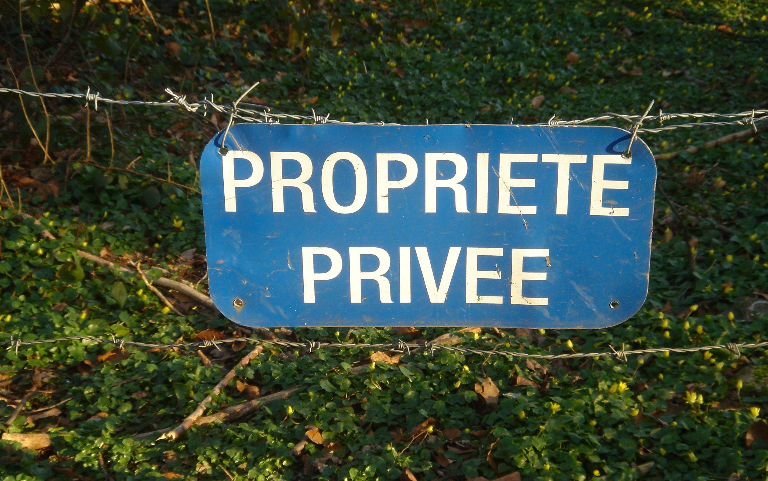 Sign "Propriété privée"